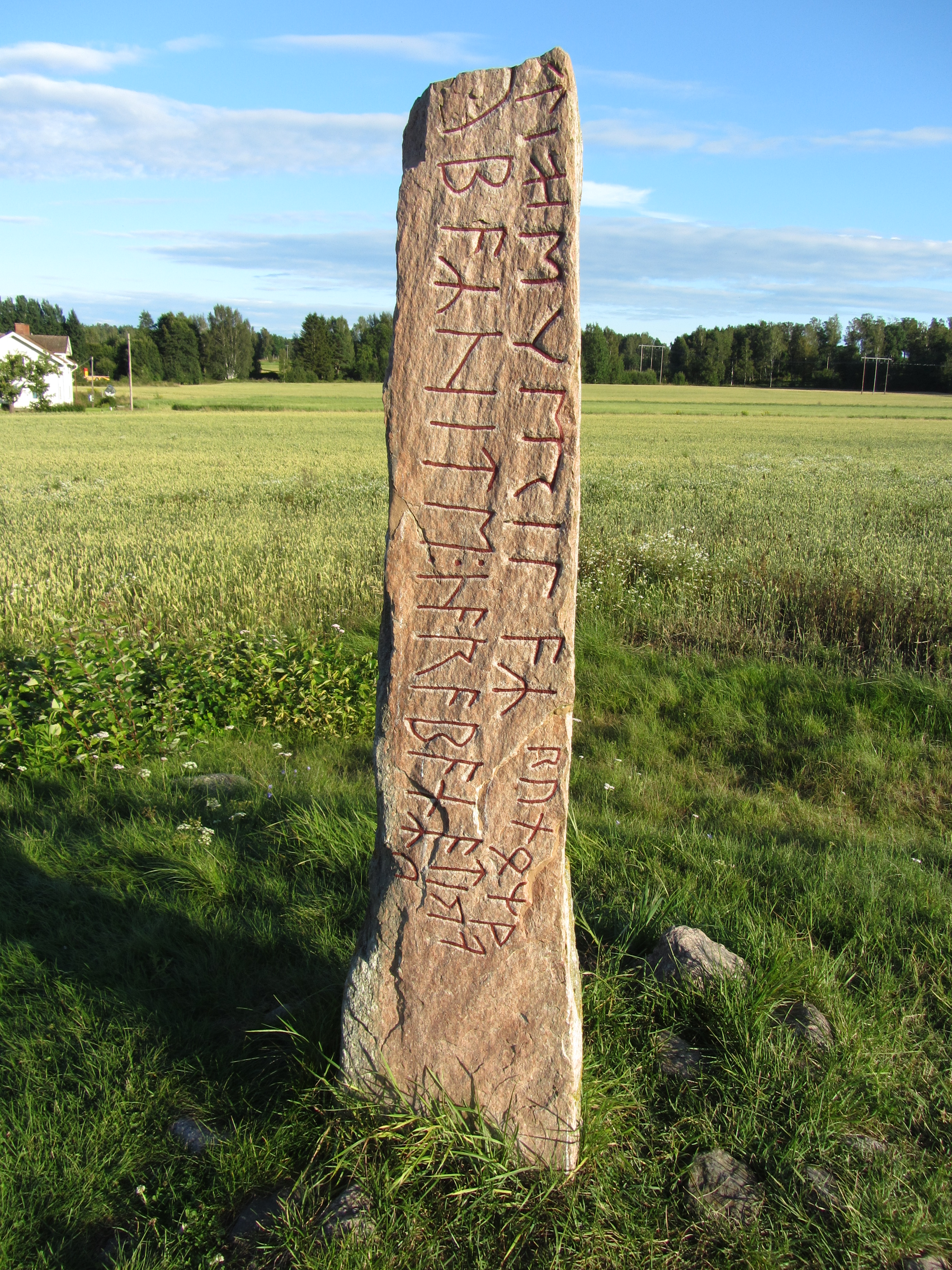 Runstenen i Järsberg, strax söder om Kristinehamn (ett par km) i sydöstra Värmland (Varnums socken, Ölme härad)